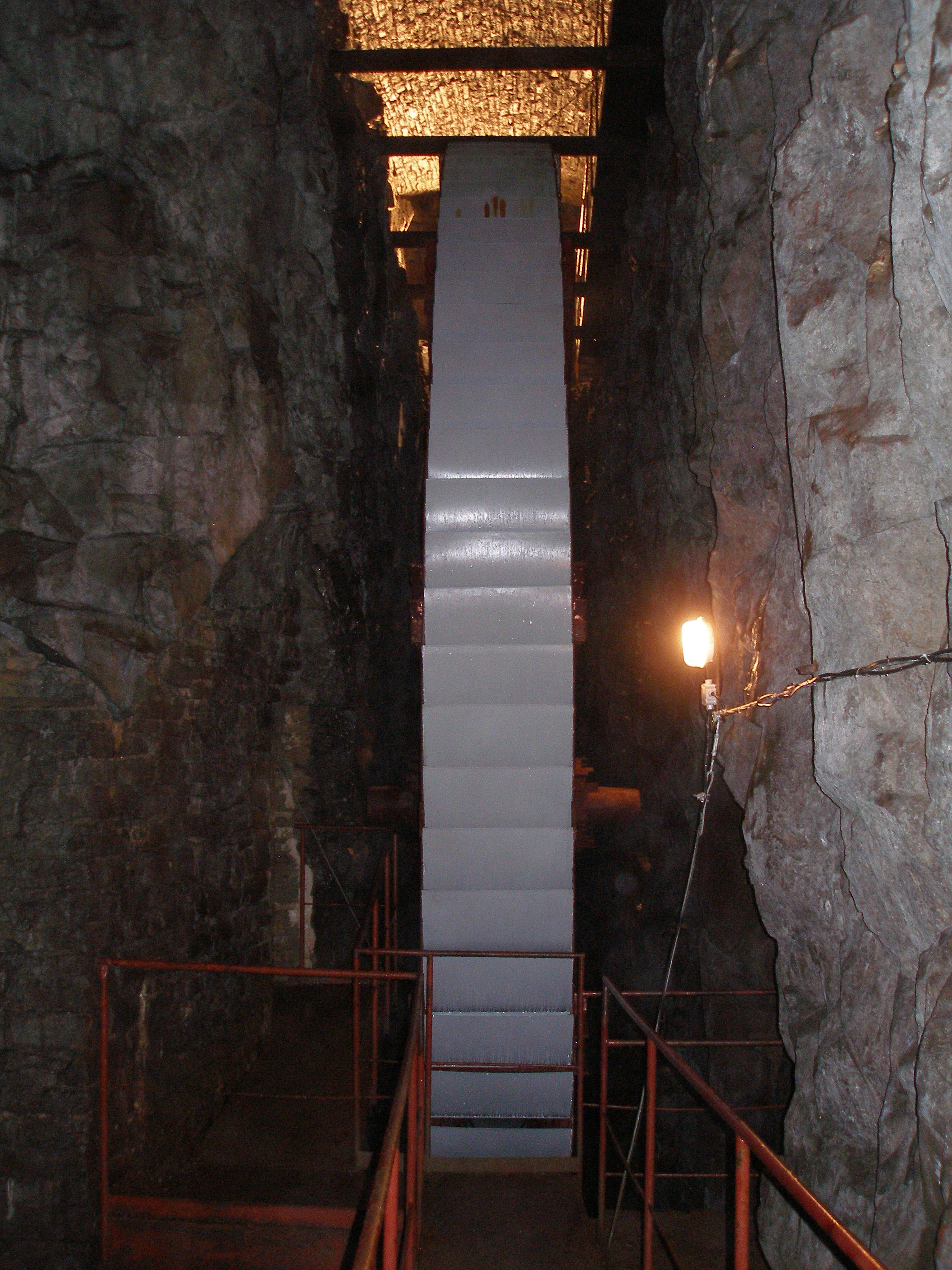 Česky: Vodní kolo v podzemí dolu Drkolnov